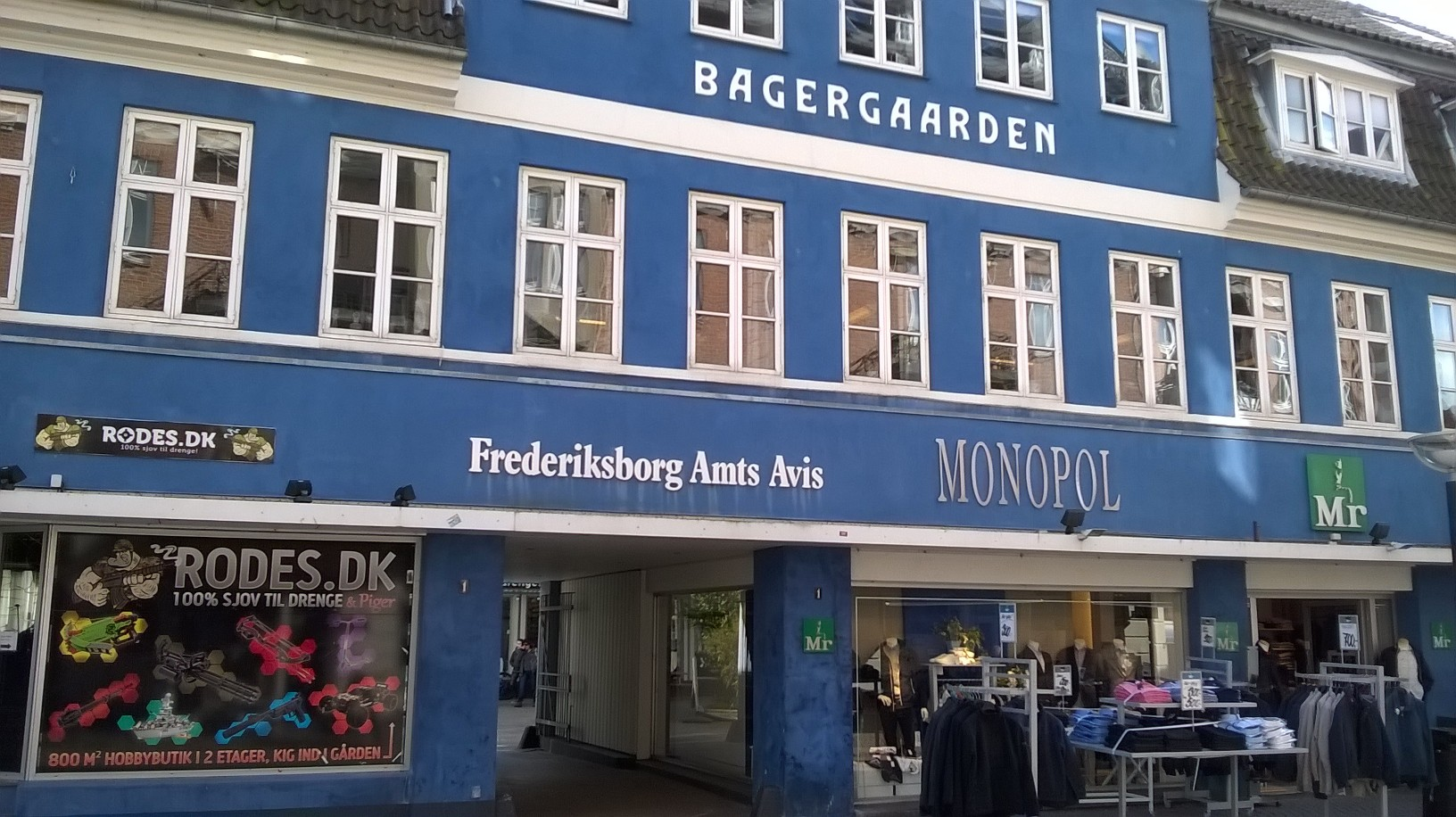 Frederiksborg Amts Avis' addresse på gågaden i Hillerød